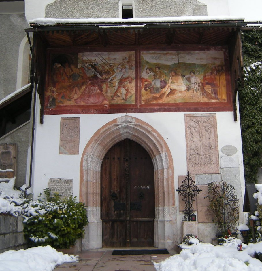 Südeingang (Haupteingang, durch den Turm) Pfarrkirche Hallstatt